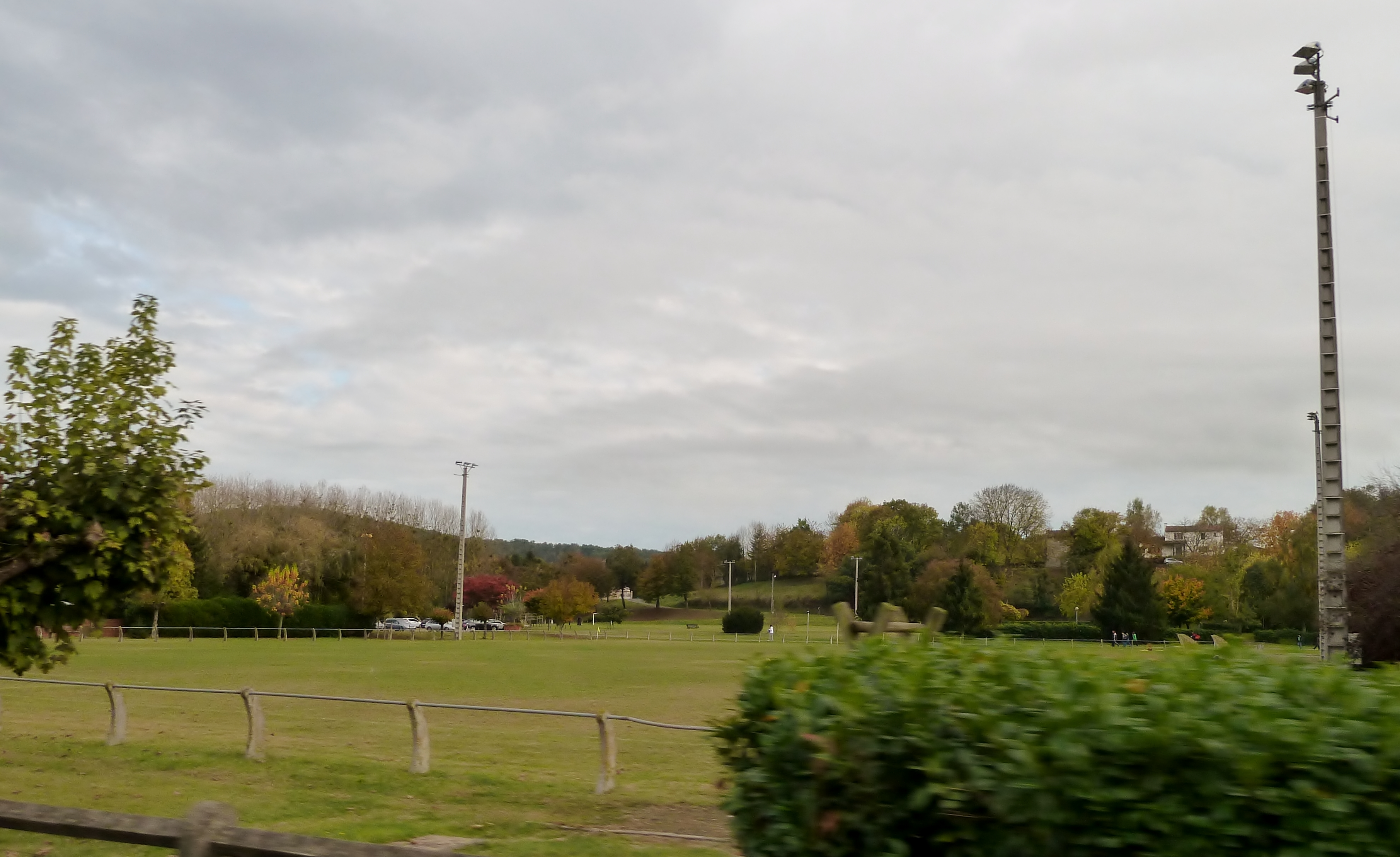 Terrain de sport de Labarthe-Rivière